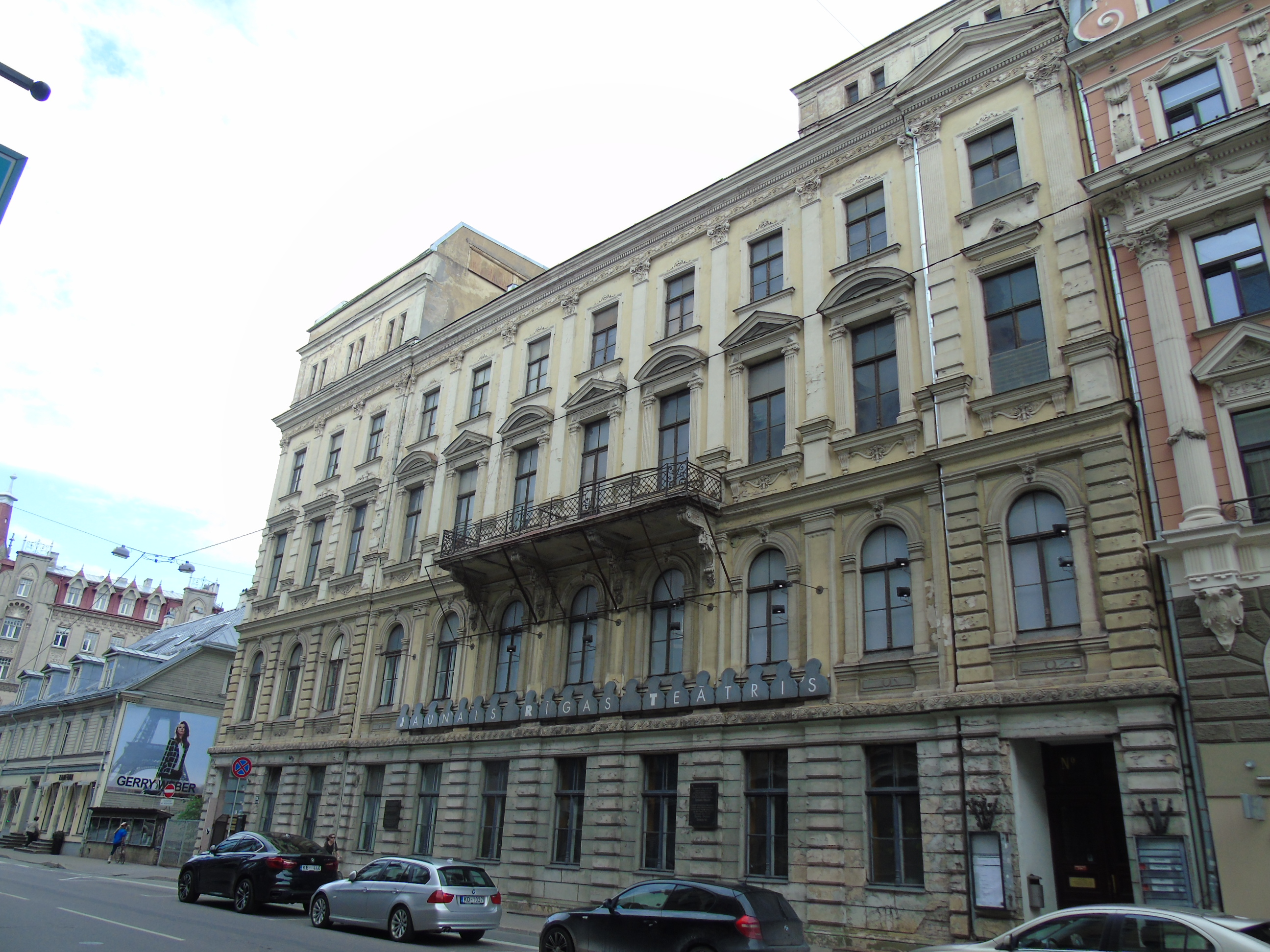 Jaunā latviešu teātra, Jaunā Rīgas teātra un Dailes teātra darbības vieta, Rīga, Lāčplēša iela 25